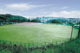 sleipnir28